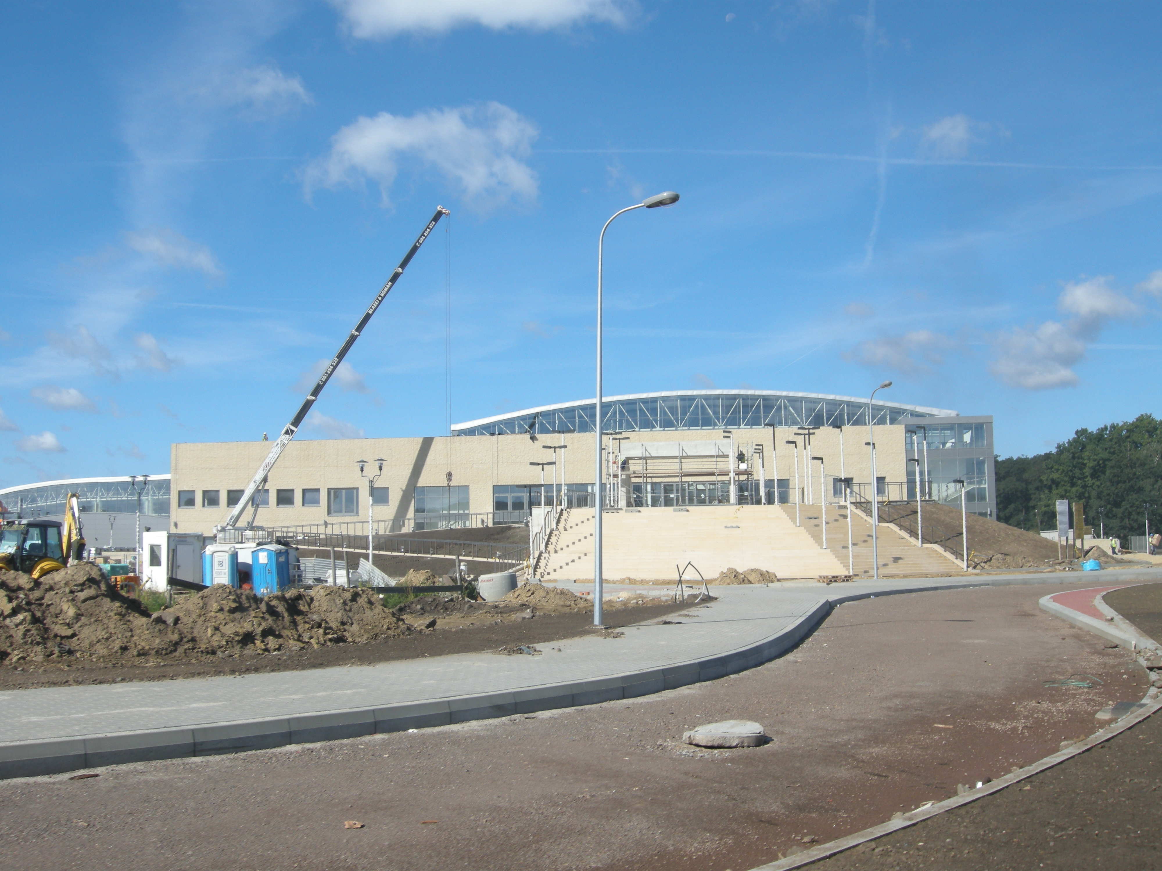 Termy maltańskie w Poznaniu.